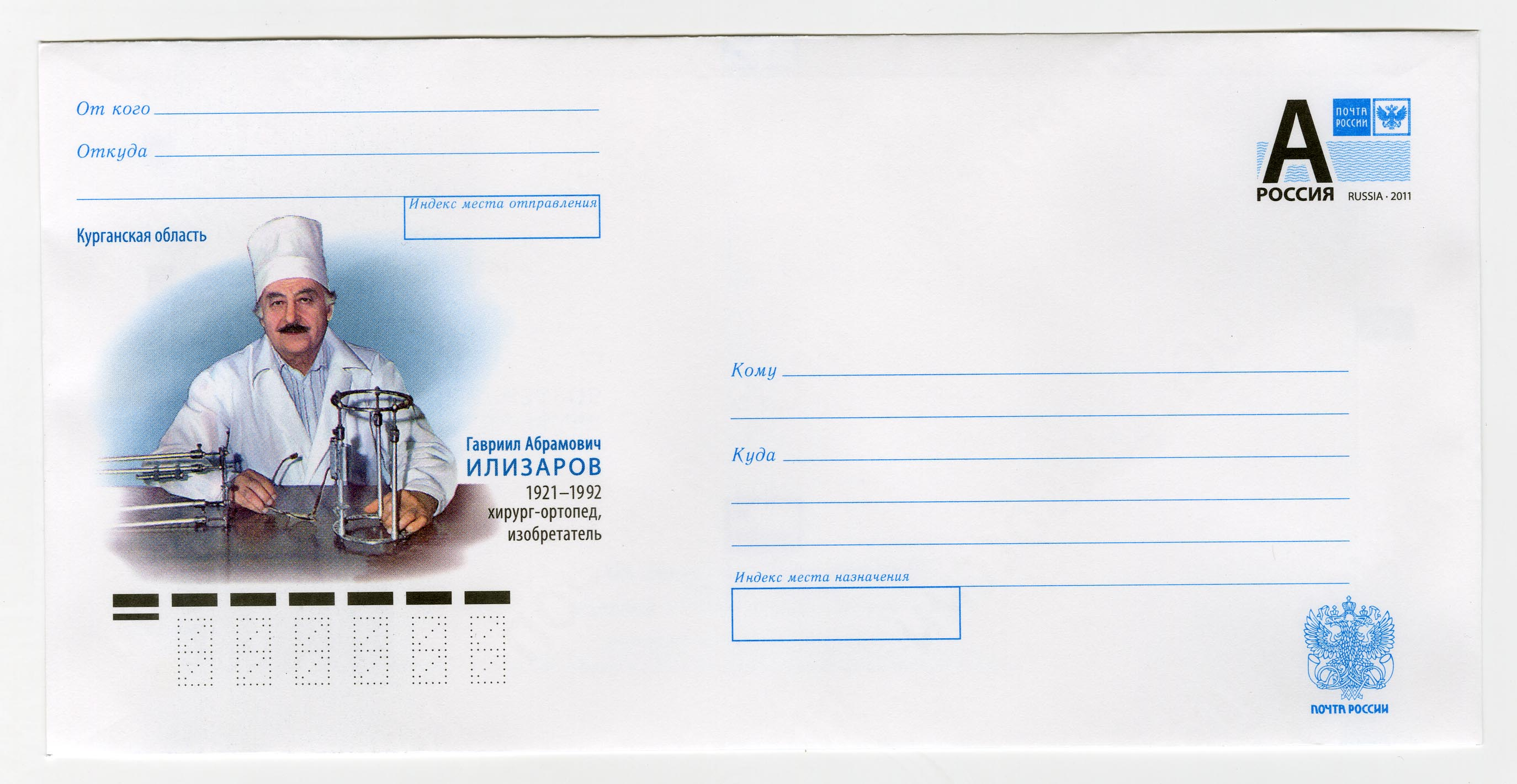 Илизаров Гавриил Абрамович, почтовый конверт